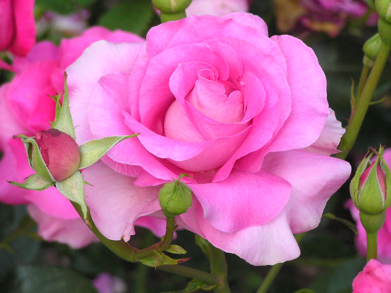 Manou Meilland マヌウメイヤン